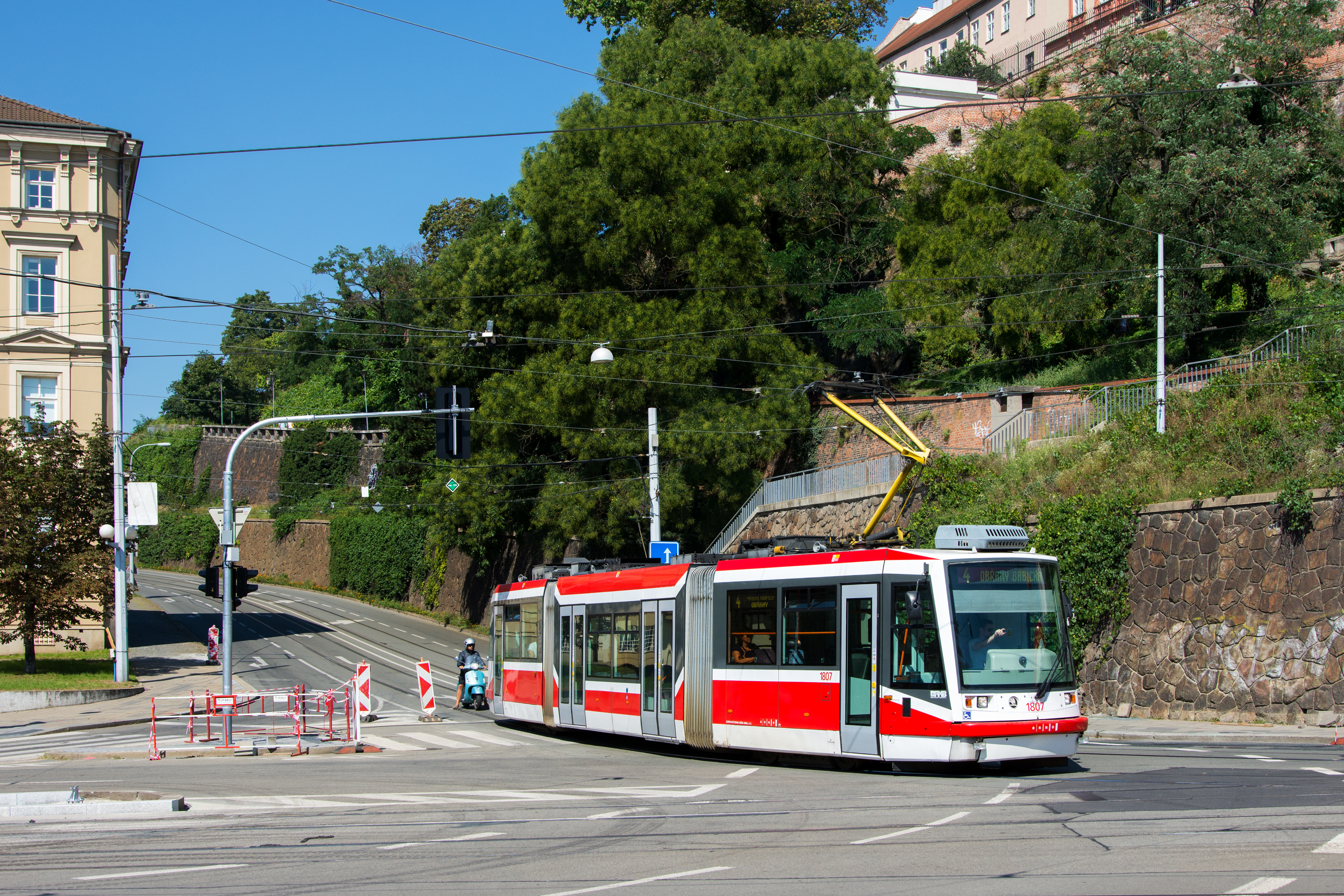 Škoda Anitra 1807 als Linie 4 nahe der Haltestelle Nové sady.